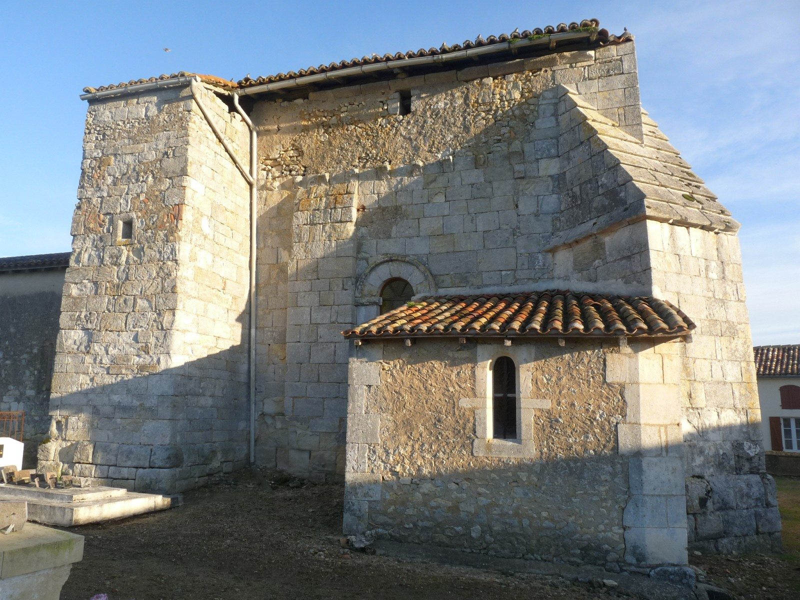 Eglise de Jussas, Charente-Maritime, France